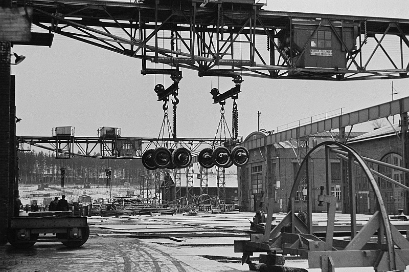 Original image description from the Deutsche Fotothek Waggonräder an einem Außenkran